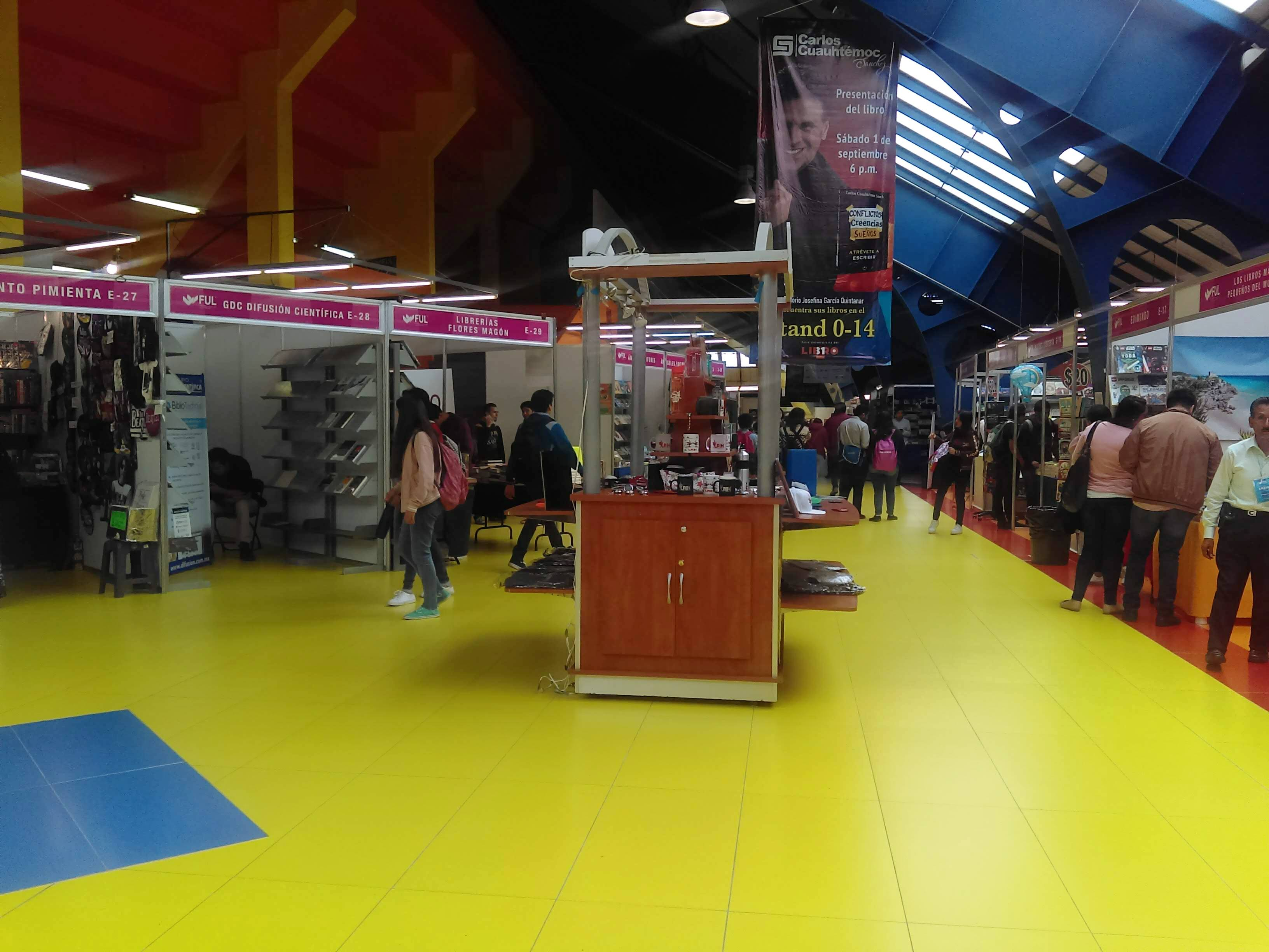 Feria Universitaria del Libro de la UAEH (2018).